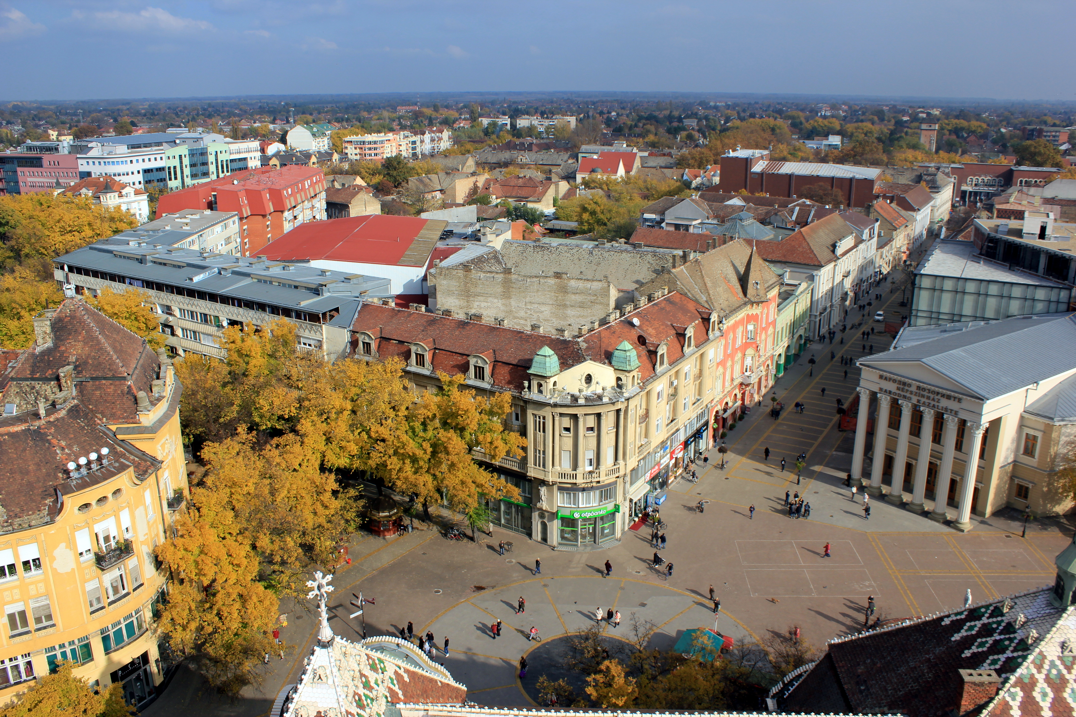 Subotica; Blick vom Rathaus über die Stadt.